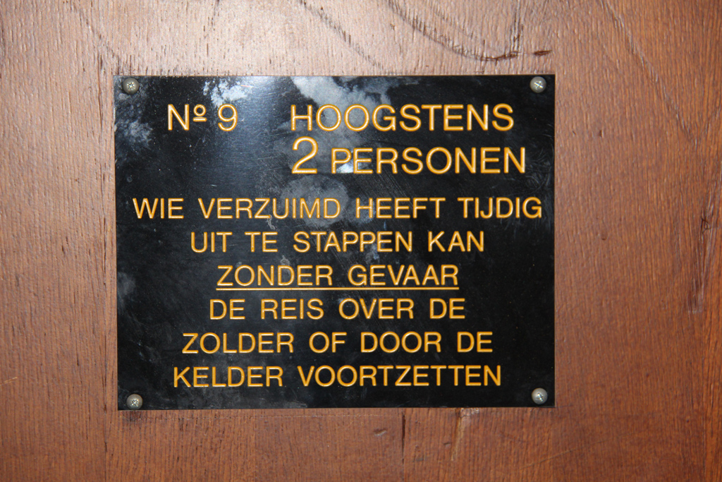 Opschrift in de paternosterlift in het HaKa-gebouw aan de Vierhavensstaat in Rotterdam.